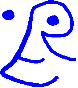 logo du Réseau école et laïcité (REEL) de Genève, revu et corrigé par moi-même.